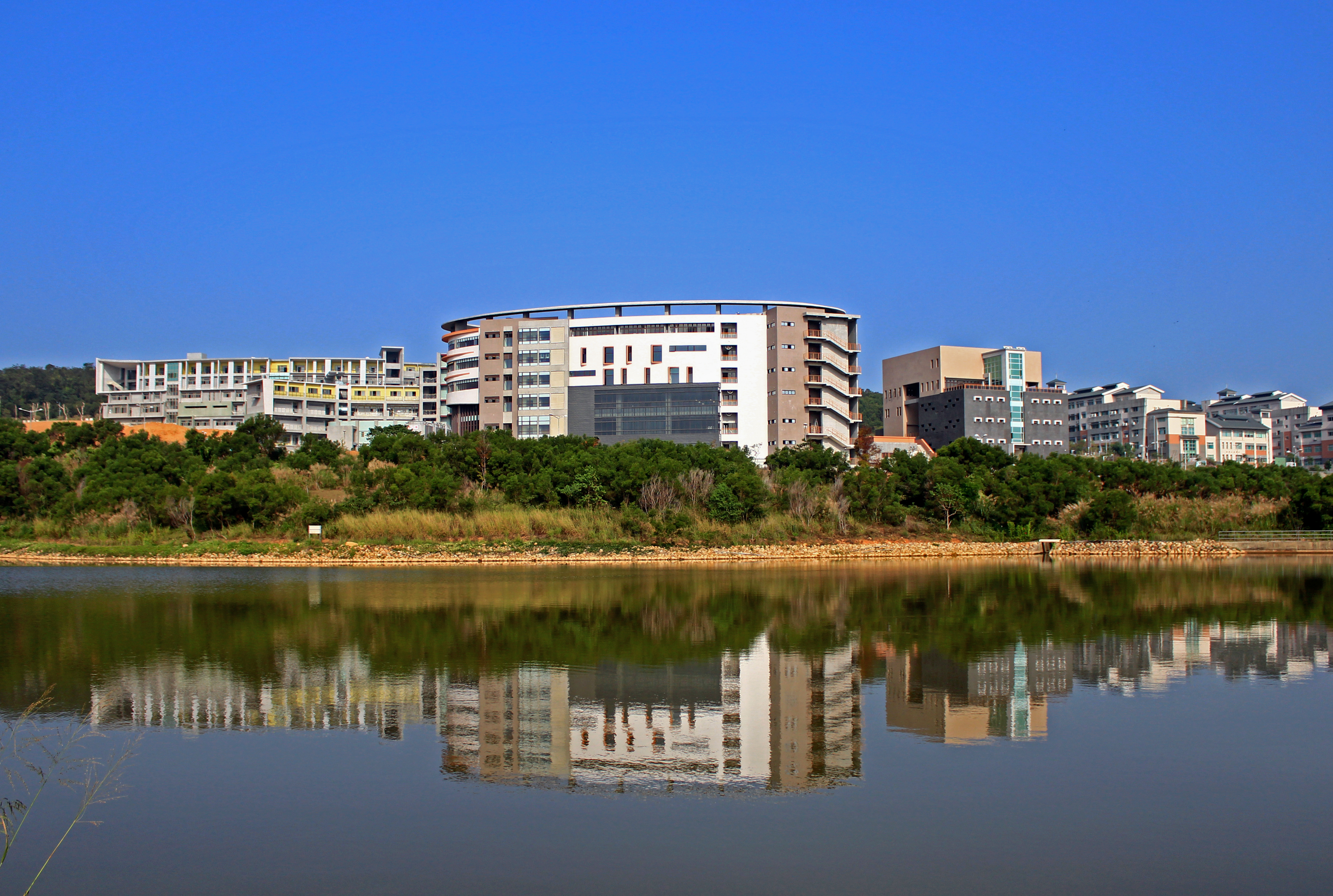 國立聯合大學大學湖